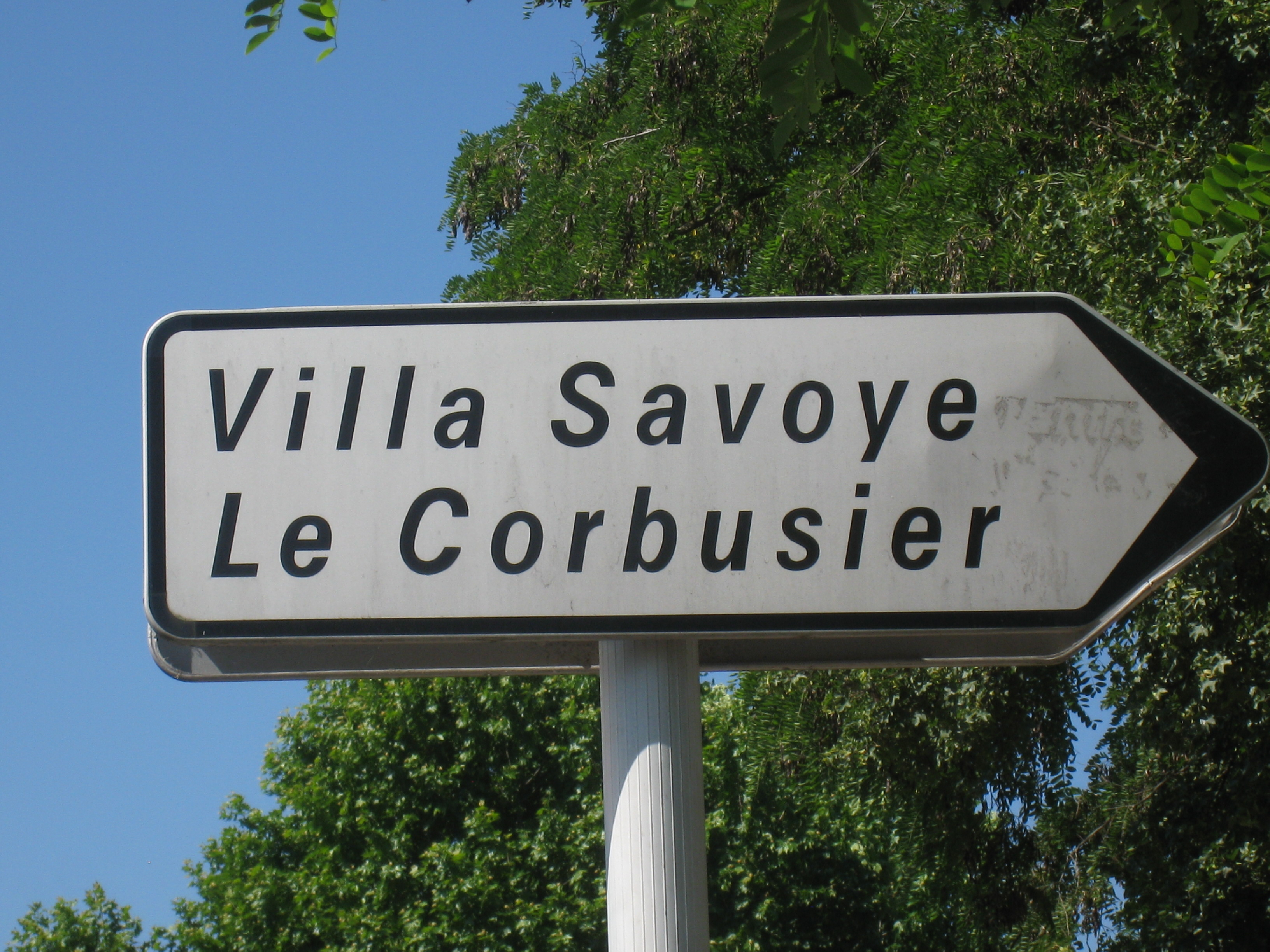 Villa Savoye te Poissy, Frankrijk